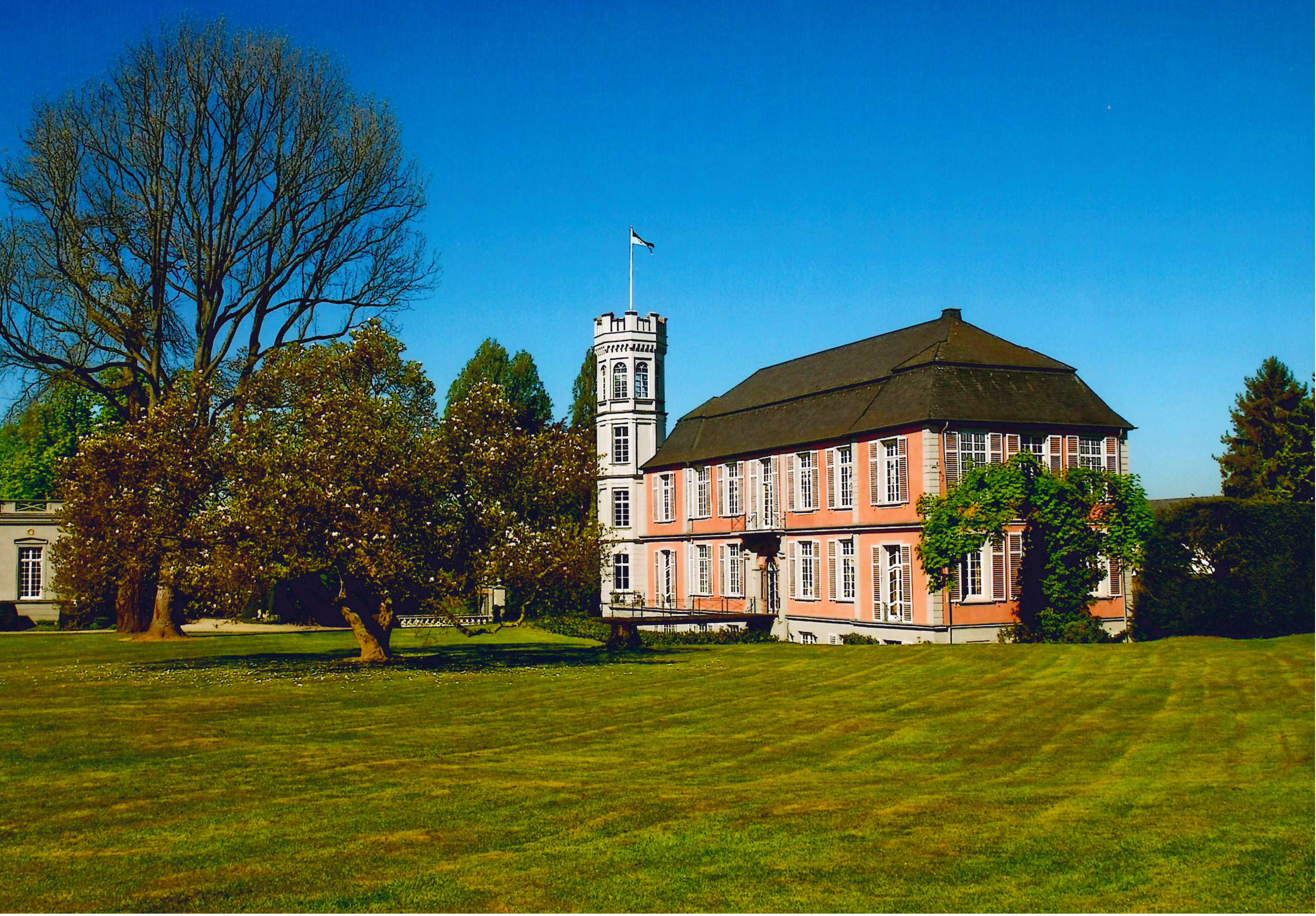 Dieses Bild zeigt das Herrenhaus von Schloss Rurich im Jahre 2015